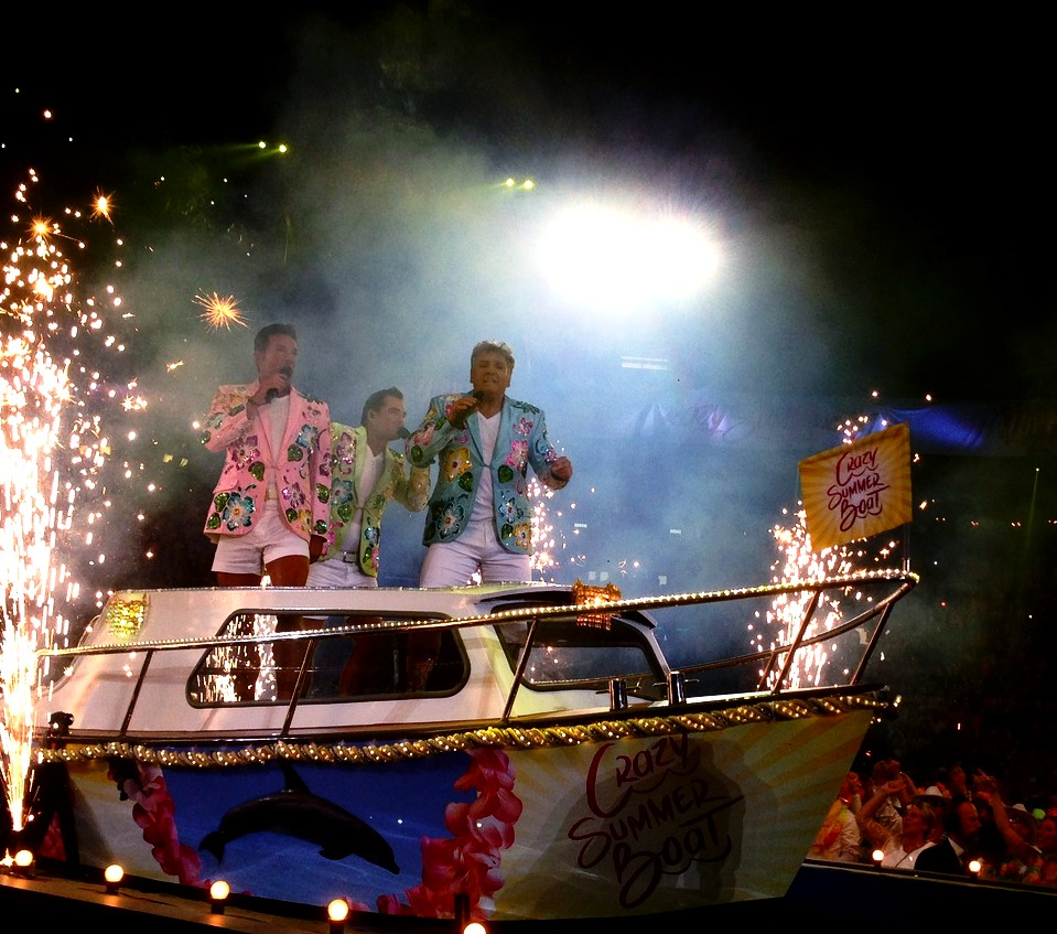 Opening Toppers in Concert 2015